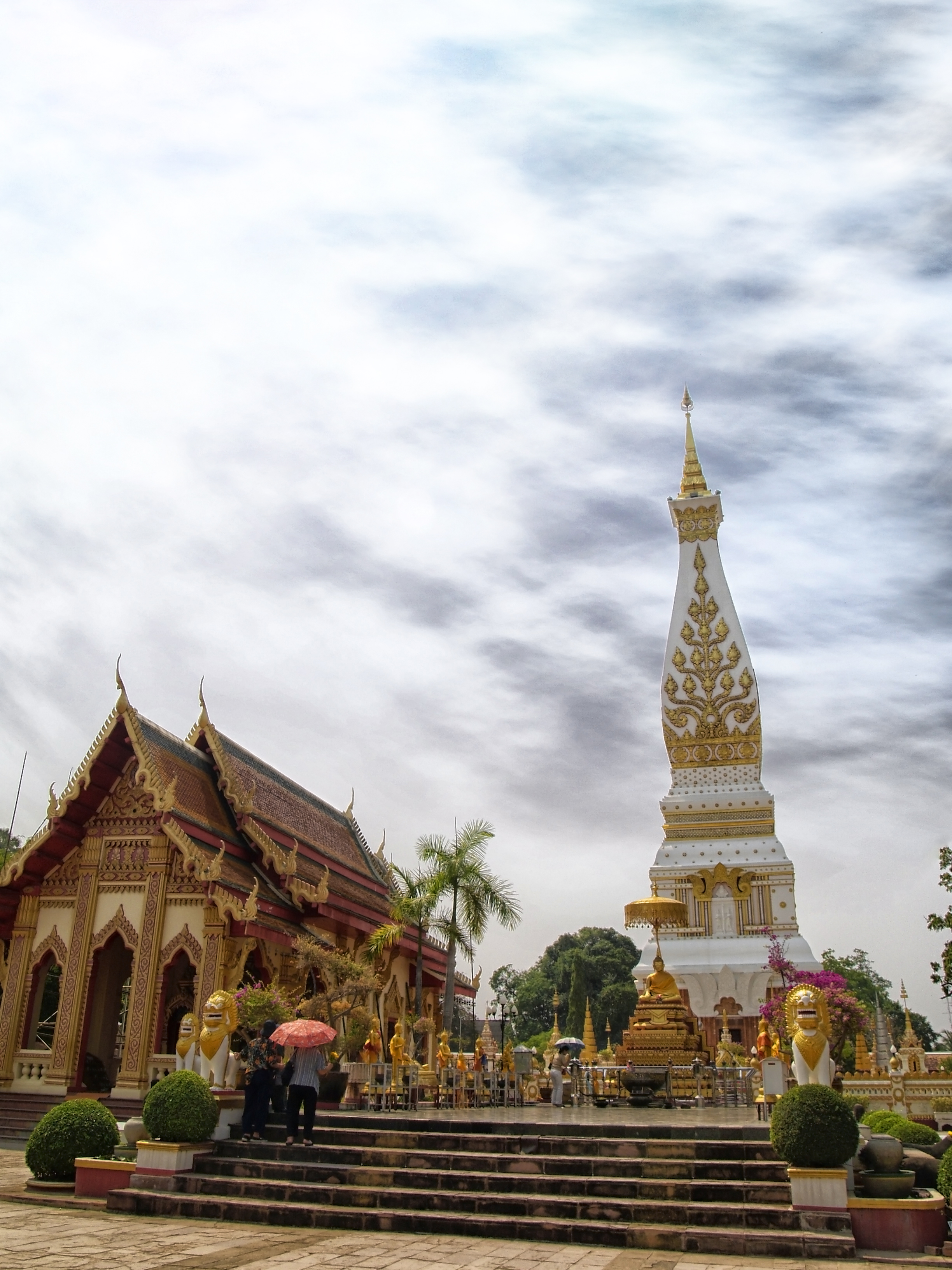 วัดพระธาตุพนมวรมหาวิหาร(พระธาตุพนม)